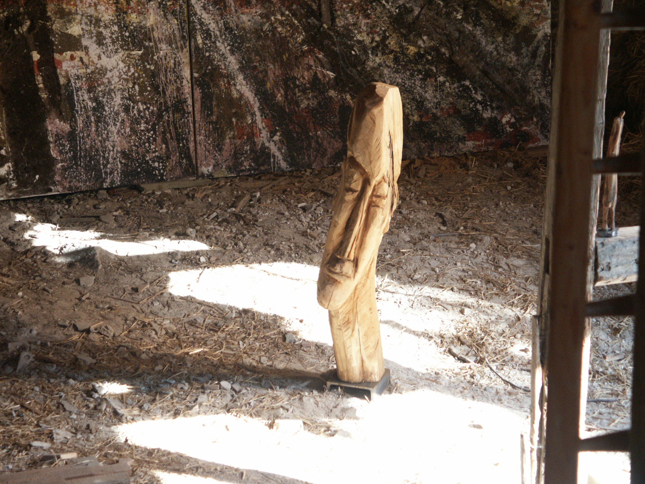 Holzskulptur von Thomas Mehrlaender bei einer Ausstellung im Jahr 2005